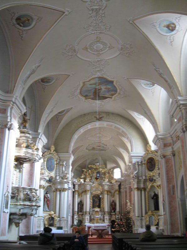 Eglise franciscaine, Cluj-Napoca, Transylvanie, Roumanie. Cluj-Napoca Franciscan Church